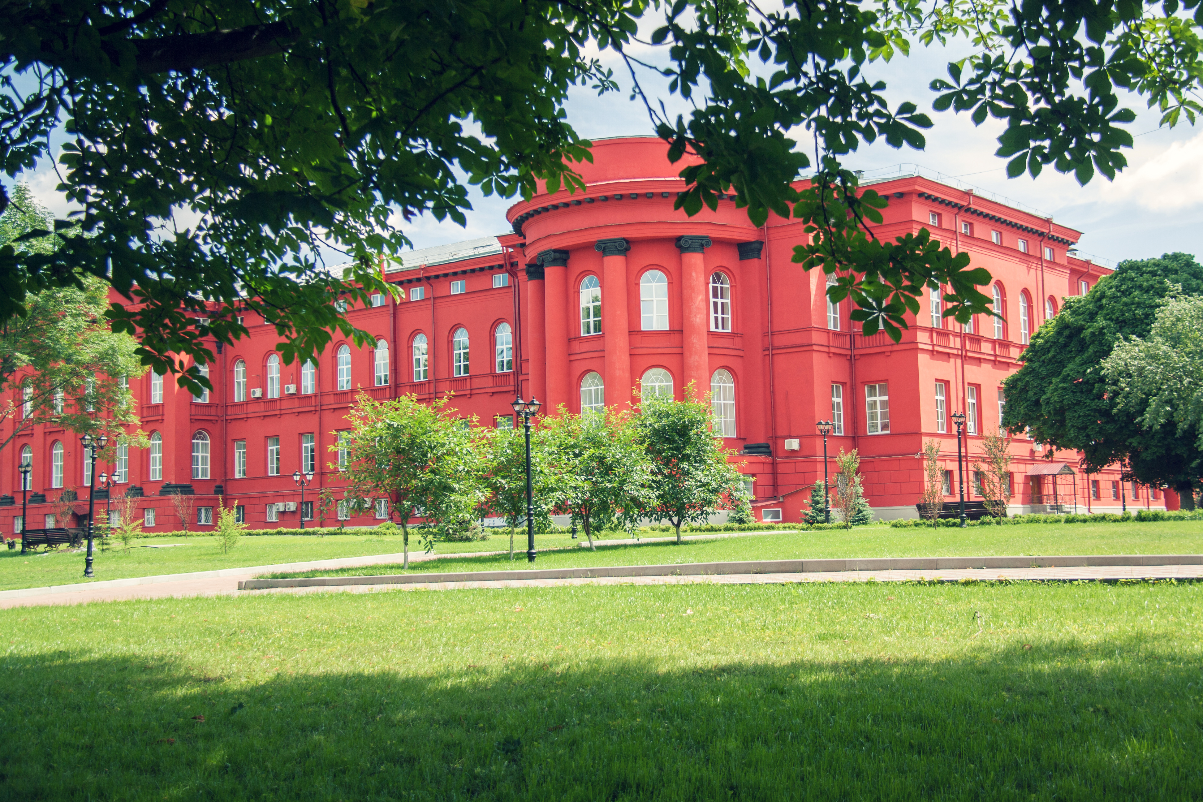 Kiev, Ucrania